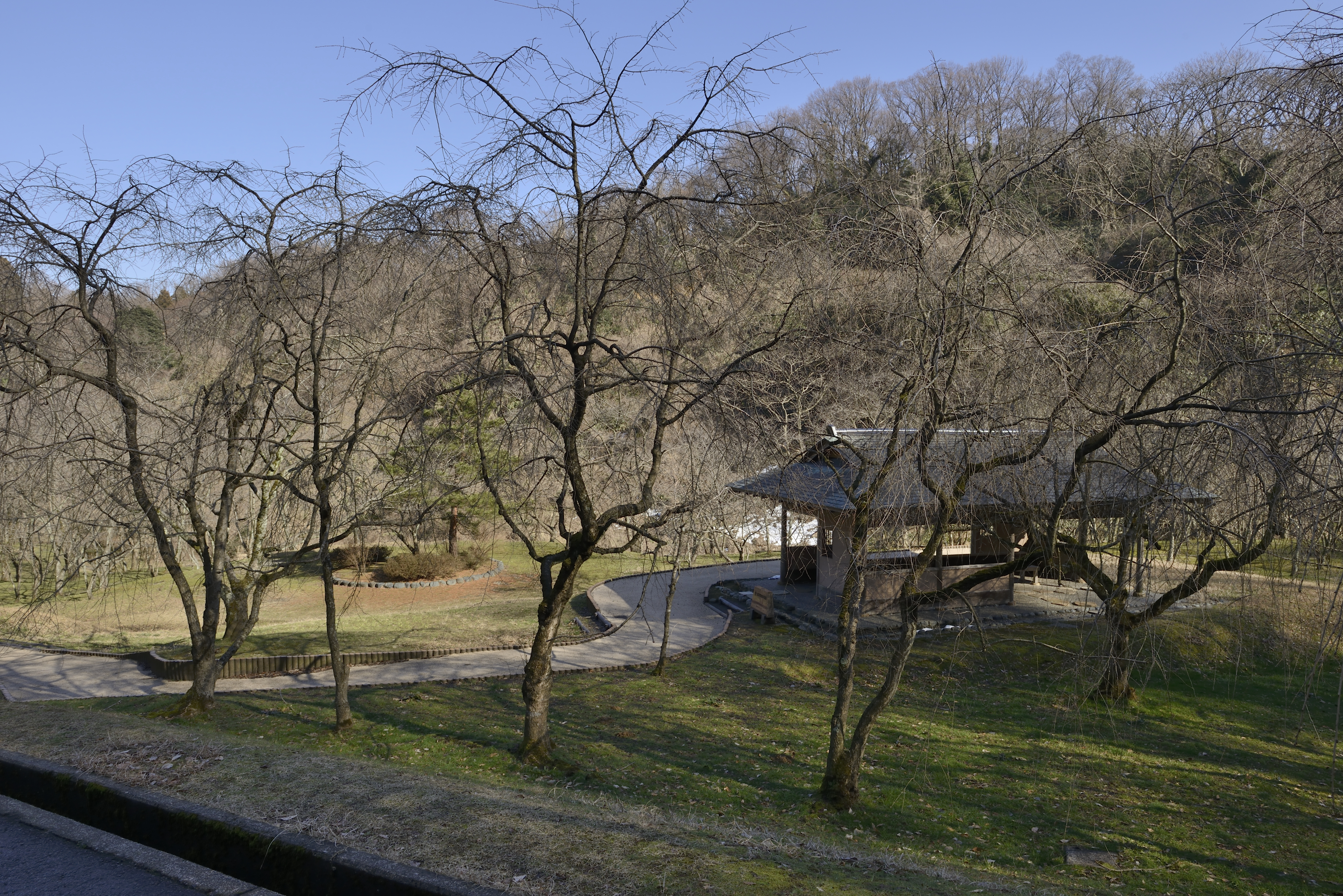 卯辰山公園